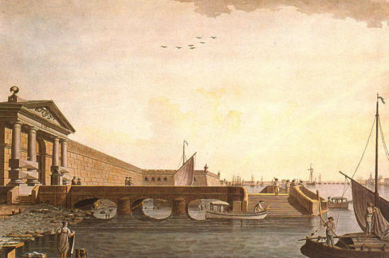 Neva gate of Peter and Paul Fortresslabel QS:Len,"Neva gate of Peter and Paul Fortress"label QS:Lru,"Невские ворота Петропавловской крепости."